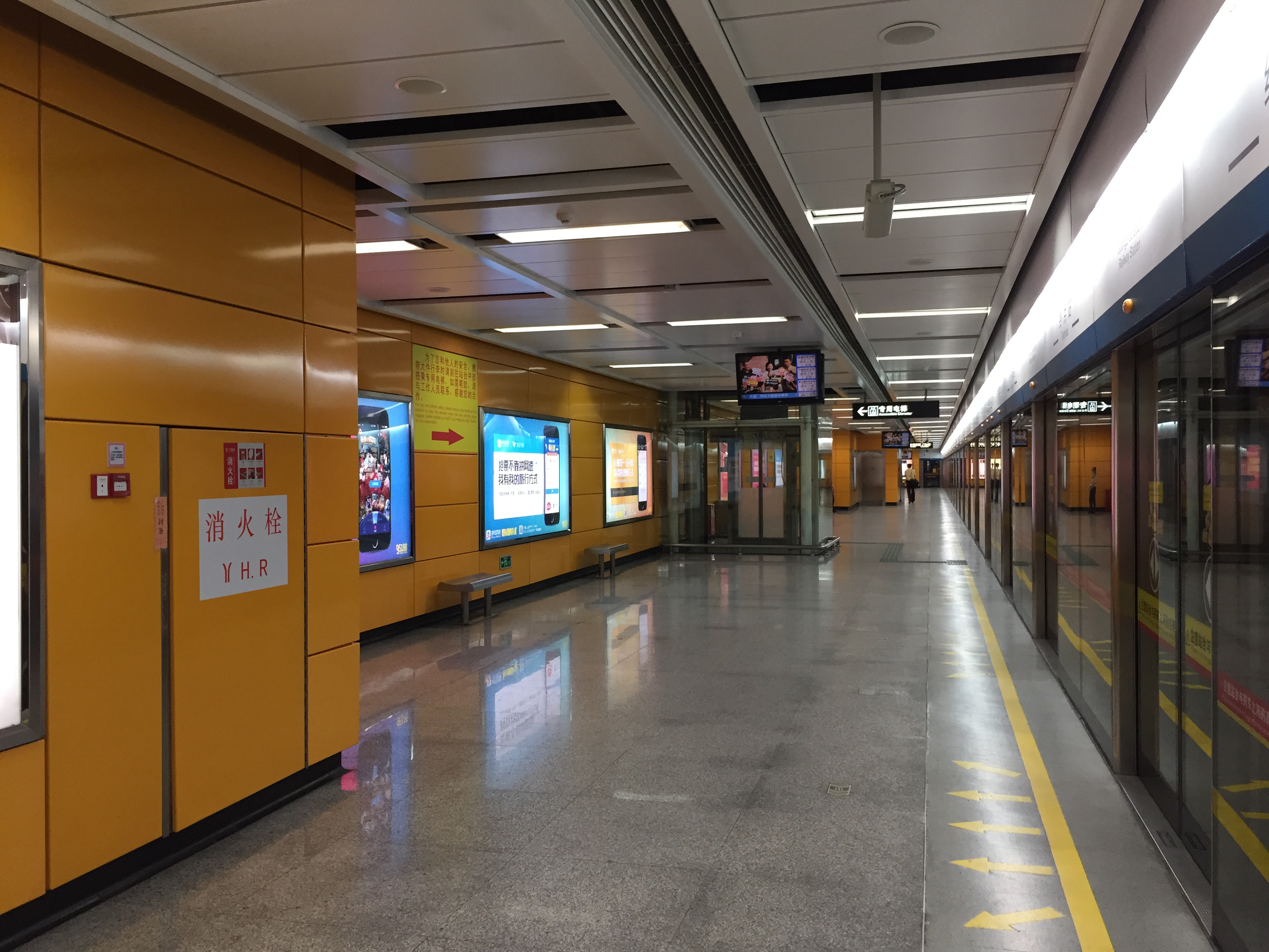 广州地铁2号线广州南站